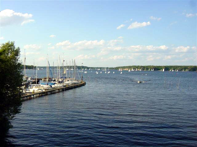 Blick von der Wannseebrücke auf den Wannsee.